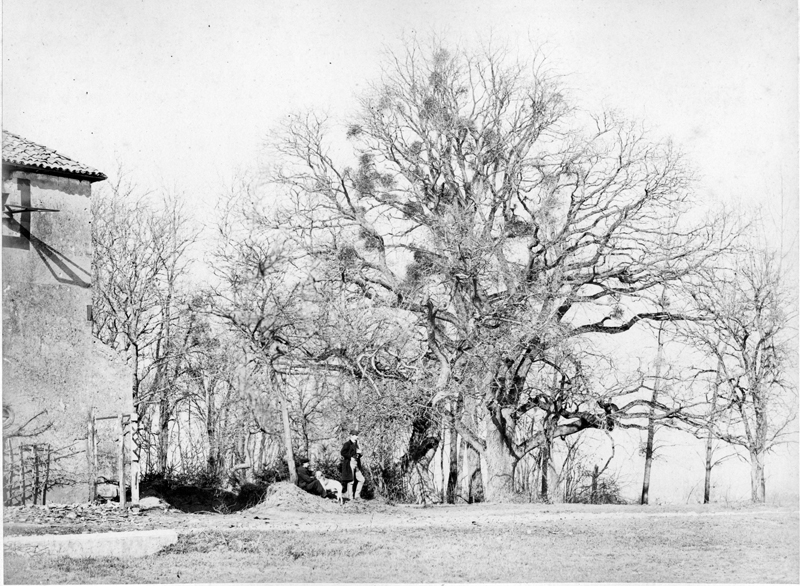 Photographie du sophora du château de Colombey après les batailles de 1870 par G. Malardot.